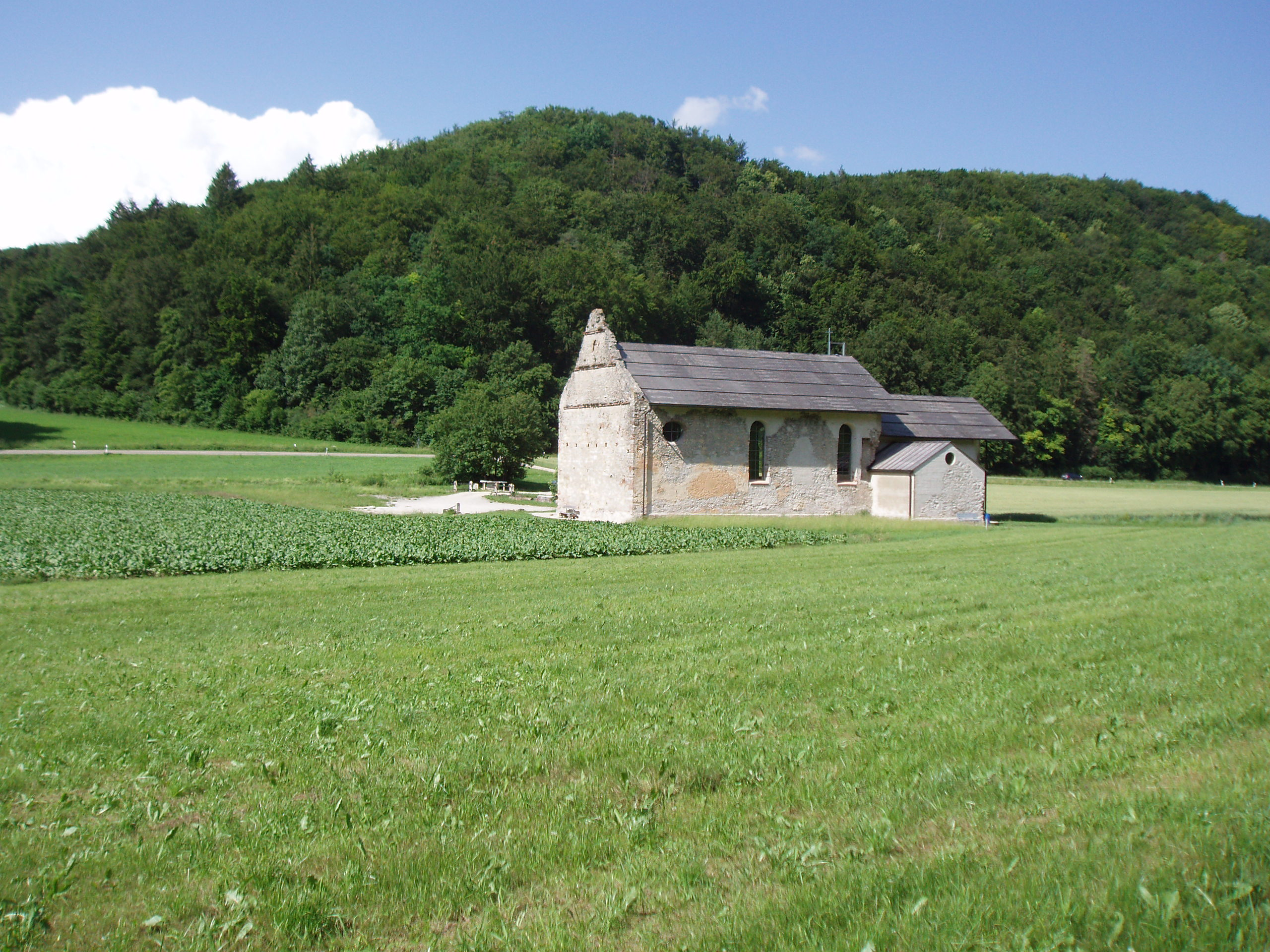 Ruinenkirche Spindeltal, Lage aus südlicher Sicht